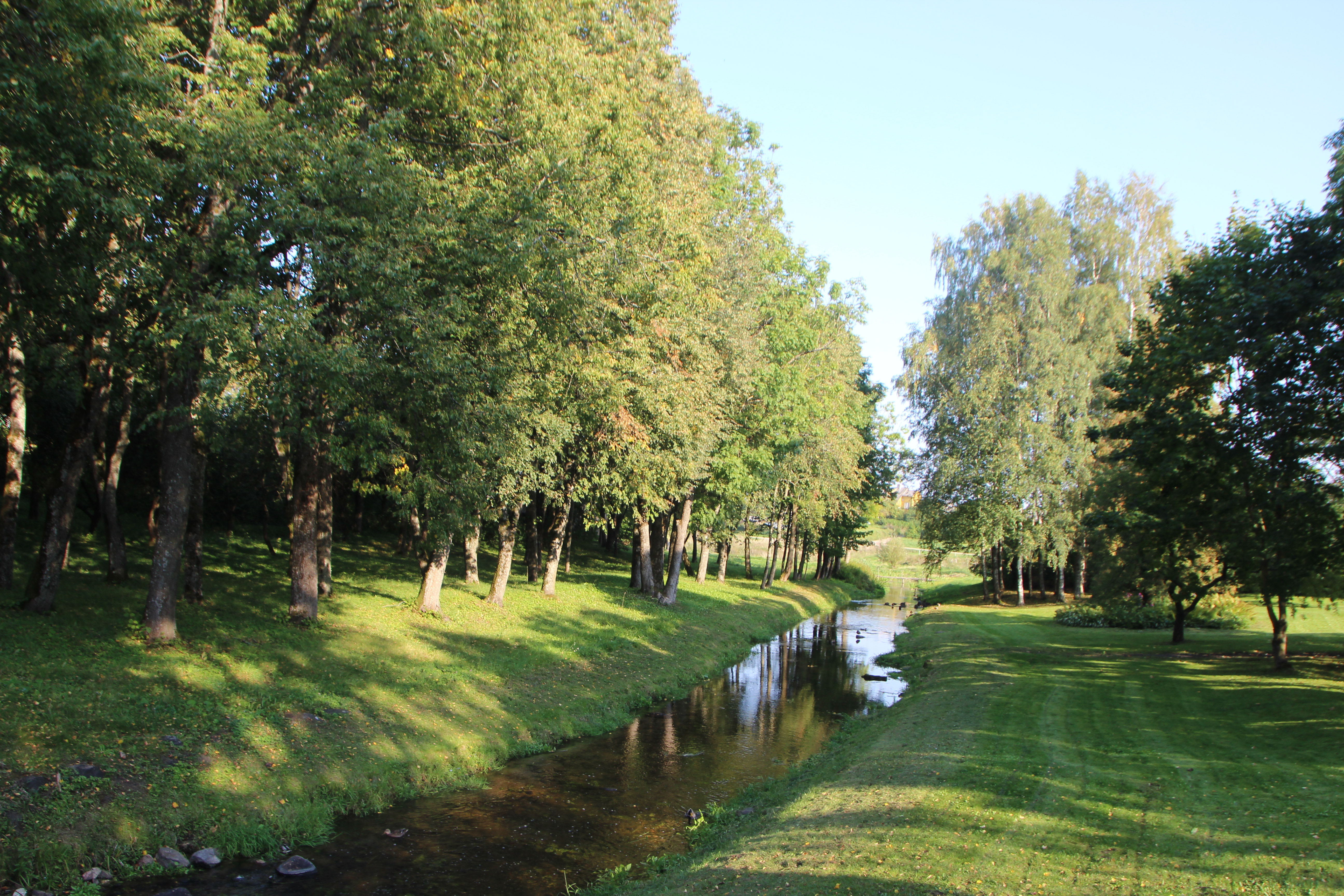 Wornie (lit. Varniai) - miasto w okręgu telszańskim na Litwie.